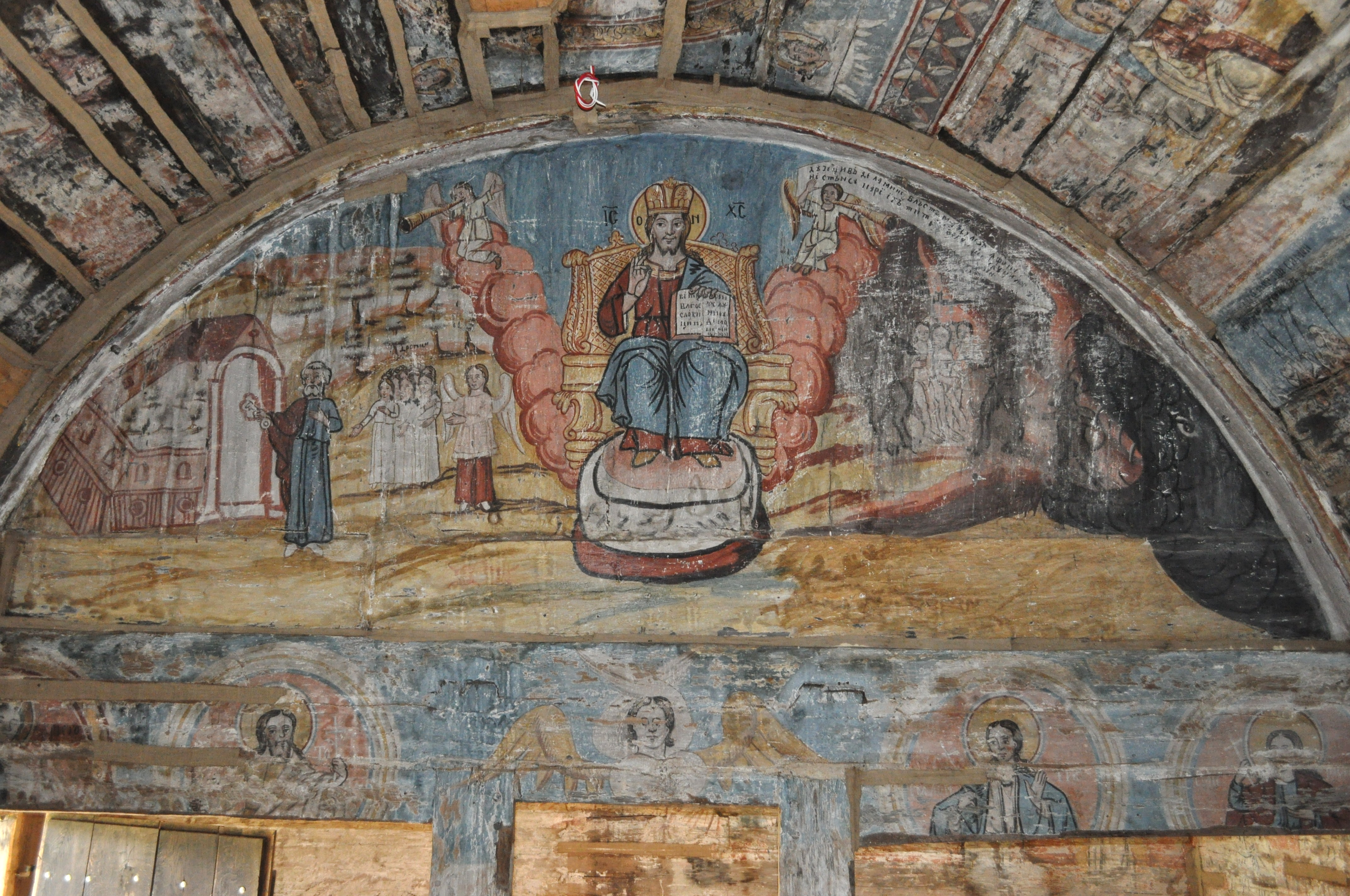 Biserica de lemn „Sf.Trei Ierarhi” din Troaș